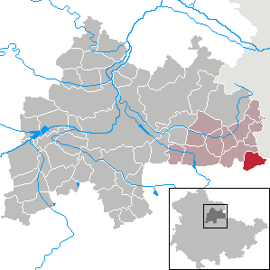 Rudersdorf in Thuringia - District Sömmerda